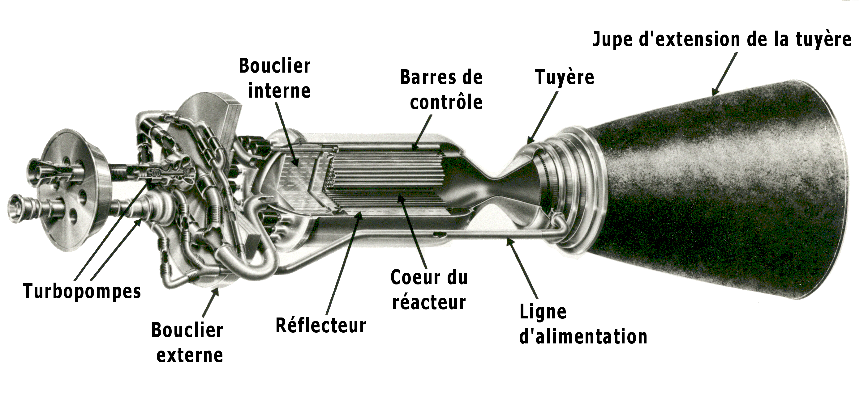 Un schéma éclaté du propulseur nucléo-thermique NERVA (Nuclear Engine for Rocket Vehicle Application).